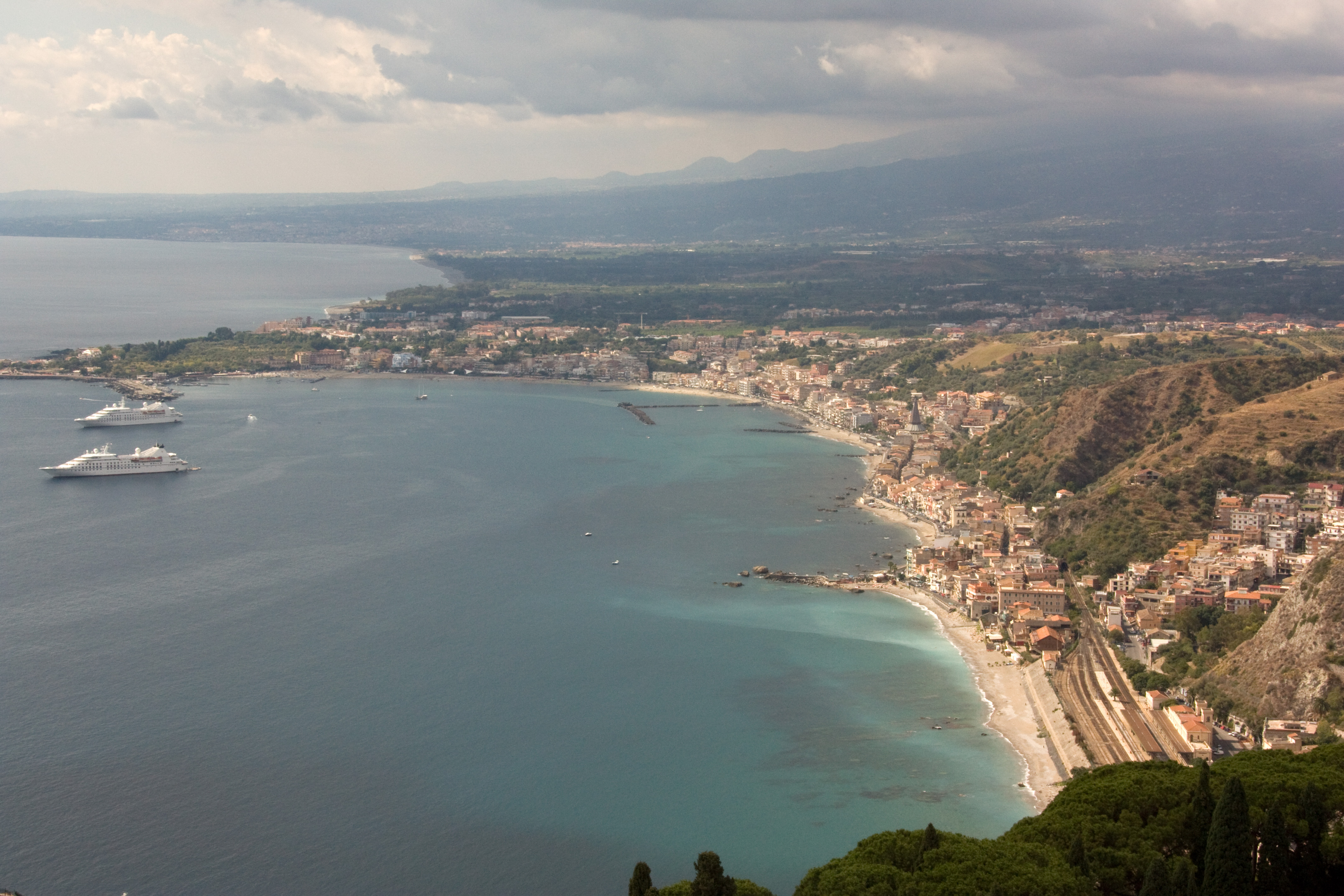 Vue de Taormina, Taormina, Sicile, Italie